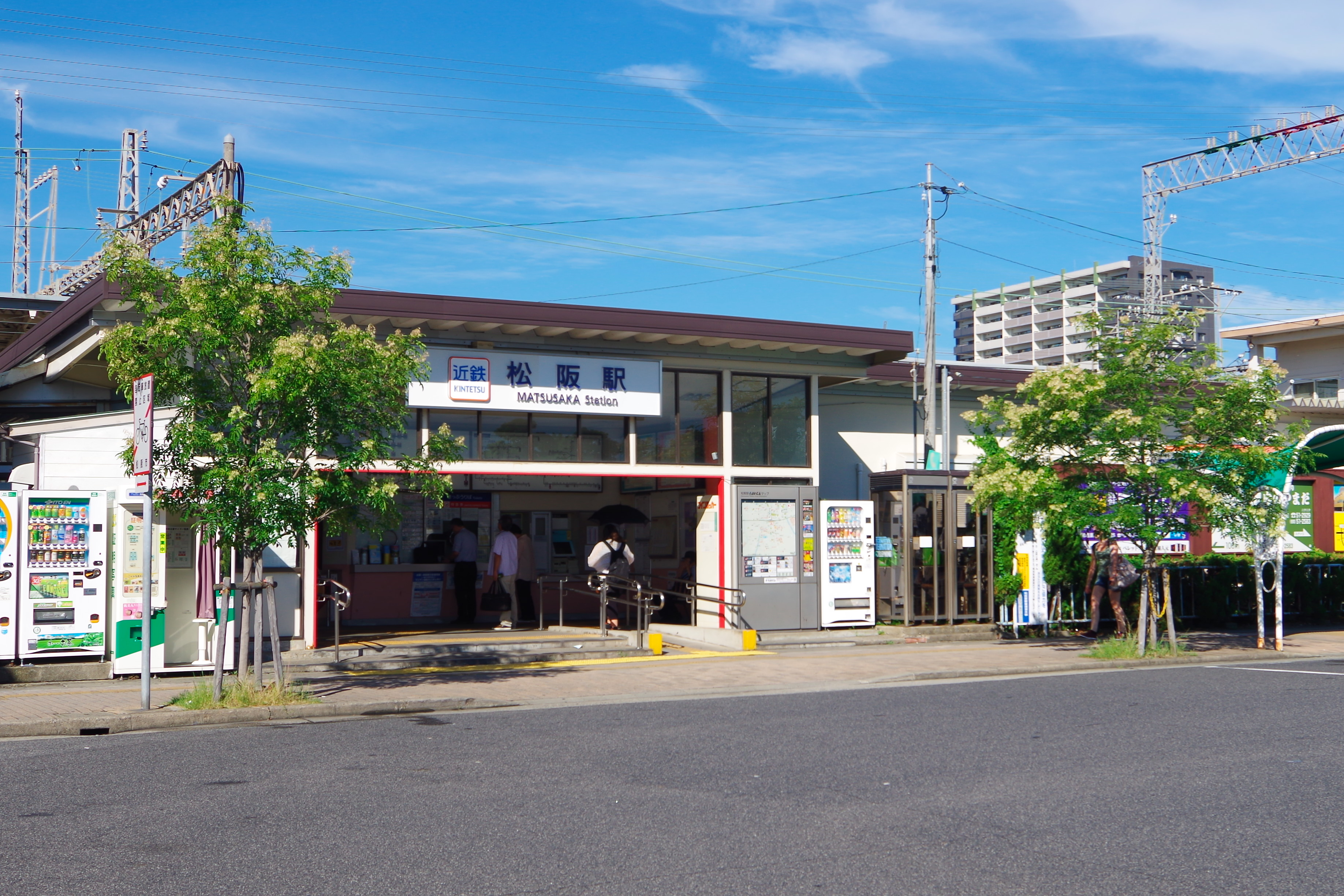 近鉄山田線 松阪駅 2014.8.20